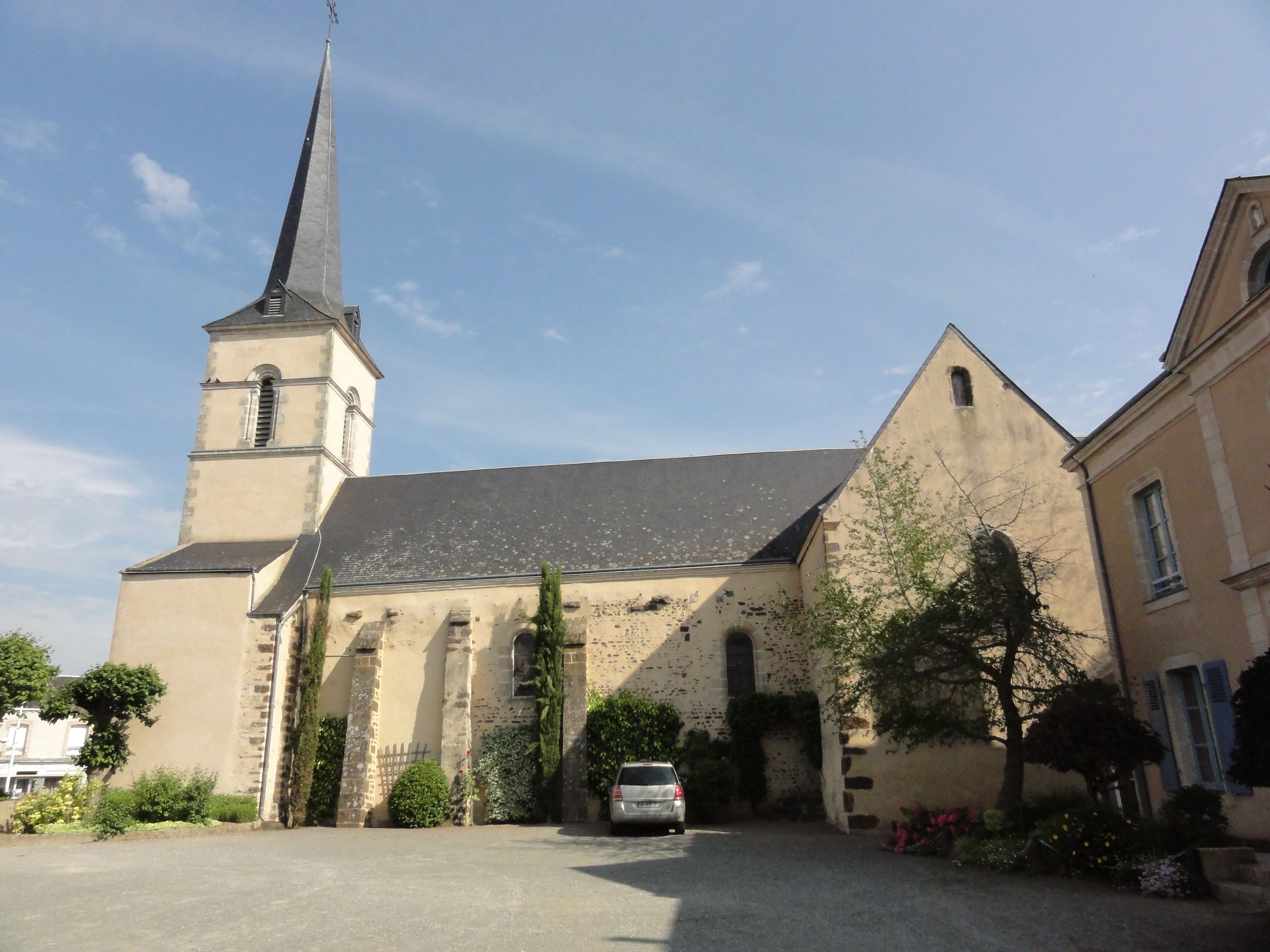 Saint-Aubin-de-Locquenay (Sarthe) église